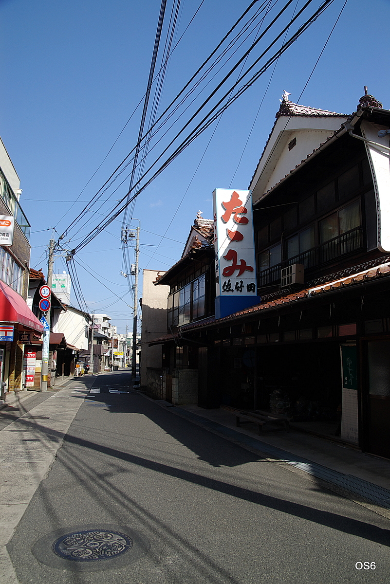 広島県東広島市西条西本町